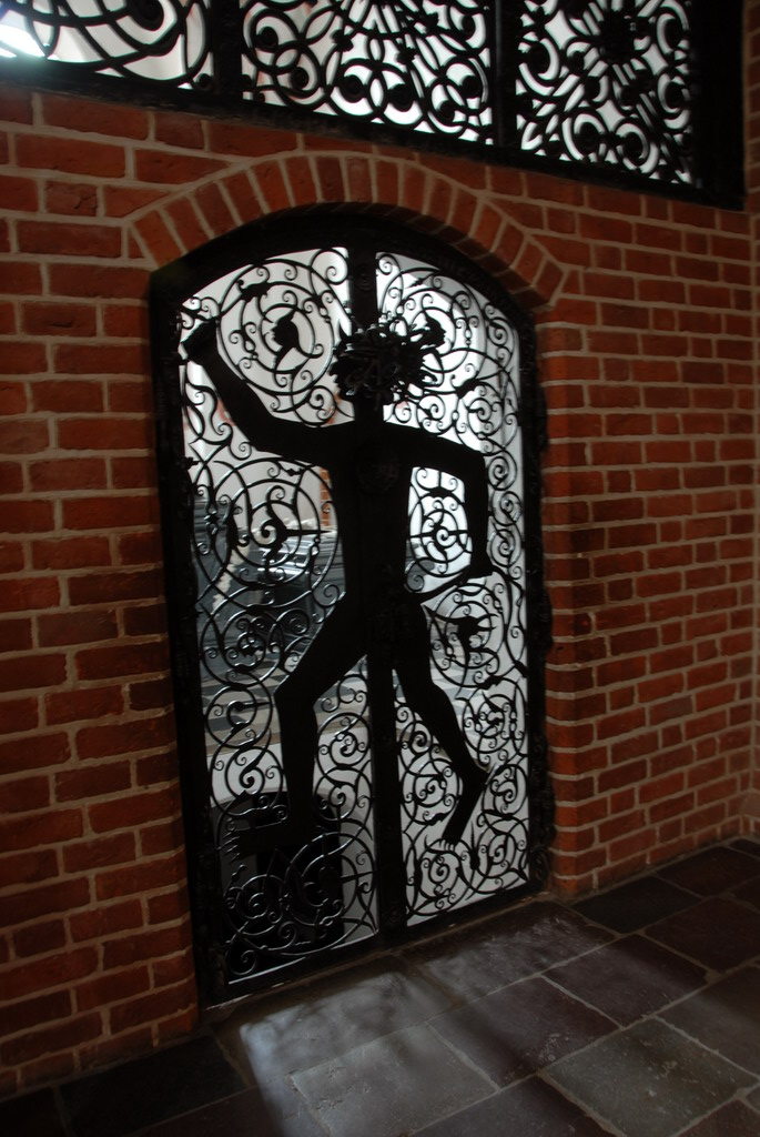 Entrance of the Northern Tower Chapel. Deze kapel was ook bestemd voor notabele burgers, leden van de families Krag en Trolle (zie het familiewapen, een trol, in het hekwerk).